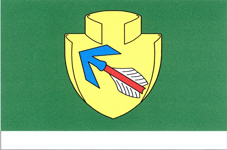 Vlajka, Novosedly, okres Strakonice